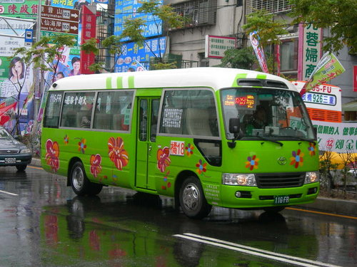 中文（台灣）: 大都會客運豐田Coaster中型巴士116-FR。